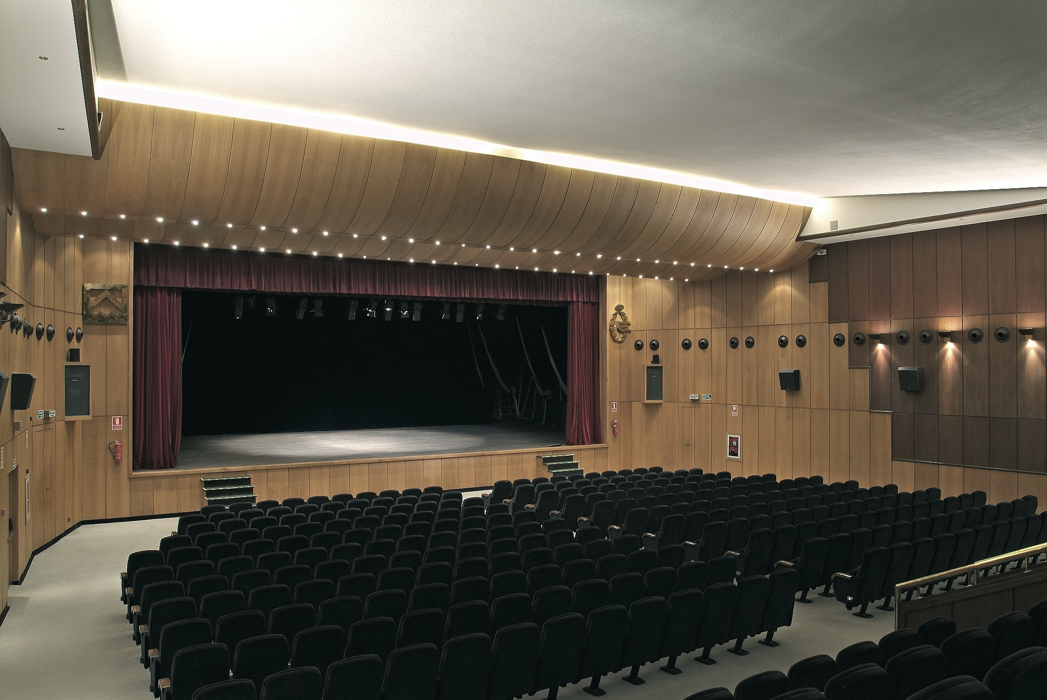 Teatro del Centro de Acción Social y Cultural de Caja Cantabria, en la calle Tatín de Santander (Cantabria, España).